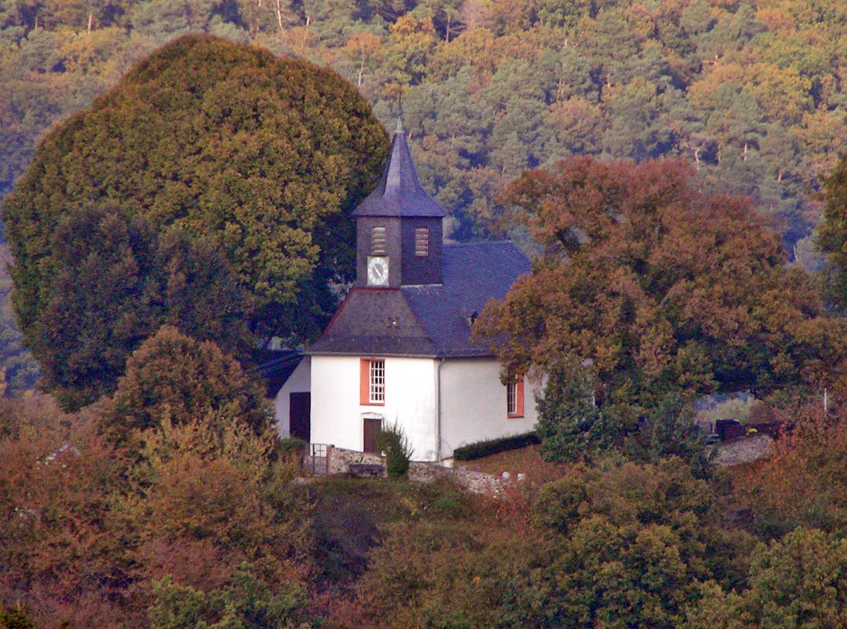 Fernansicht der Kapelle in Oberlauken, Weilrod, Deutschland